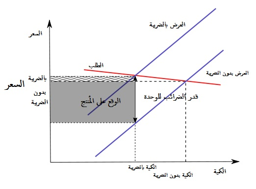 العرض الغير مرن والمرونة الطلبية